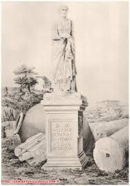 Statue